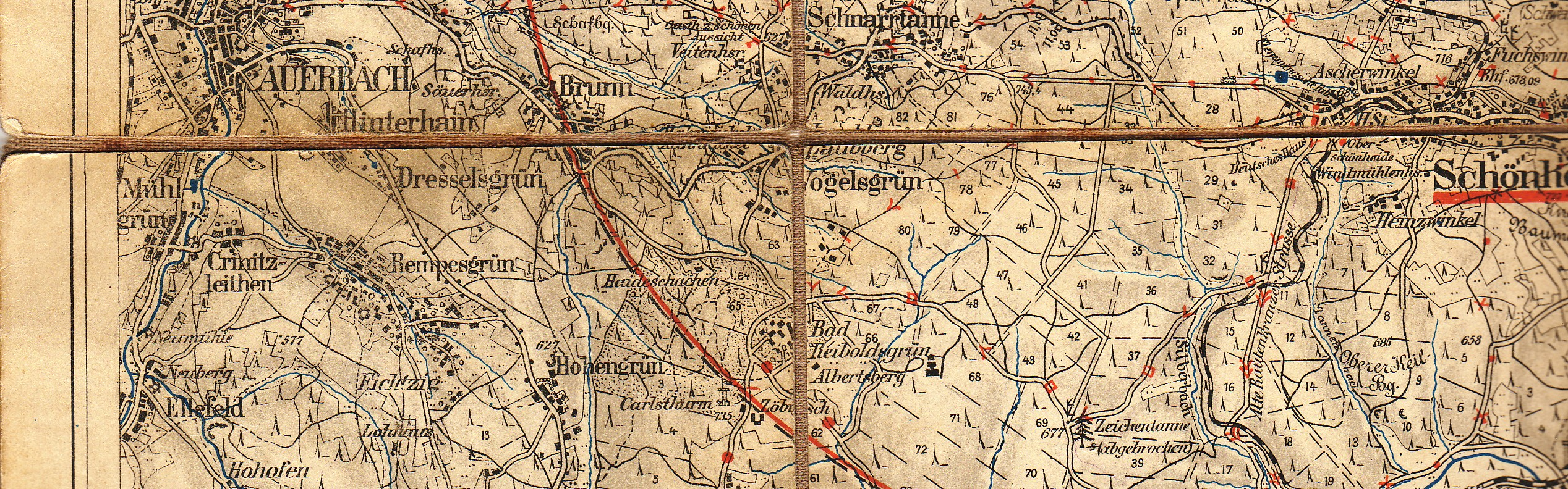 Die bedeutenden Lungenheilstätten im Grenzgebiet Westerzgebirge/Vogtland lagen zwischen Auerbach/Vogtland und Schönheide im Erzgebirge. Von West nach Ost waren dies Bad Reiboldsgrün, Albertsberg (1896/97 für männliche Patienten eröffnet und nach dem sächsischen König Albert benannt) und Carolagrün (für Frauen, 1899 eröffnet und nach Carola benannt, der Frau des Königs Albert). Auf dieser um das Jahr 1900 erschienenen Karte ist Carolagrün noch nicht verzeichnet. Es liegt etwa Zwischen dem „N“ von Reiboldsgrün und dem Silberbach.